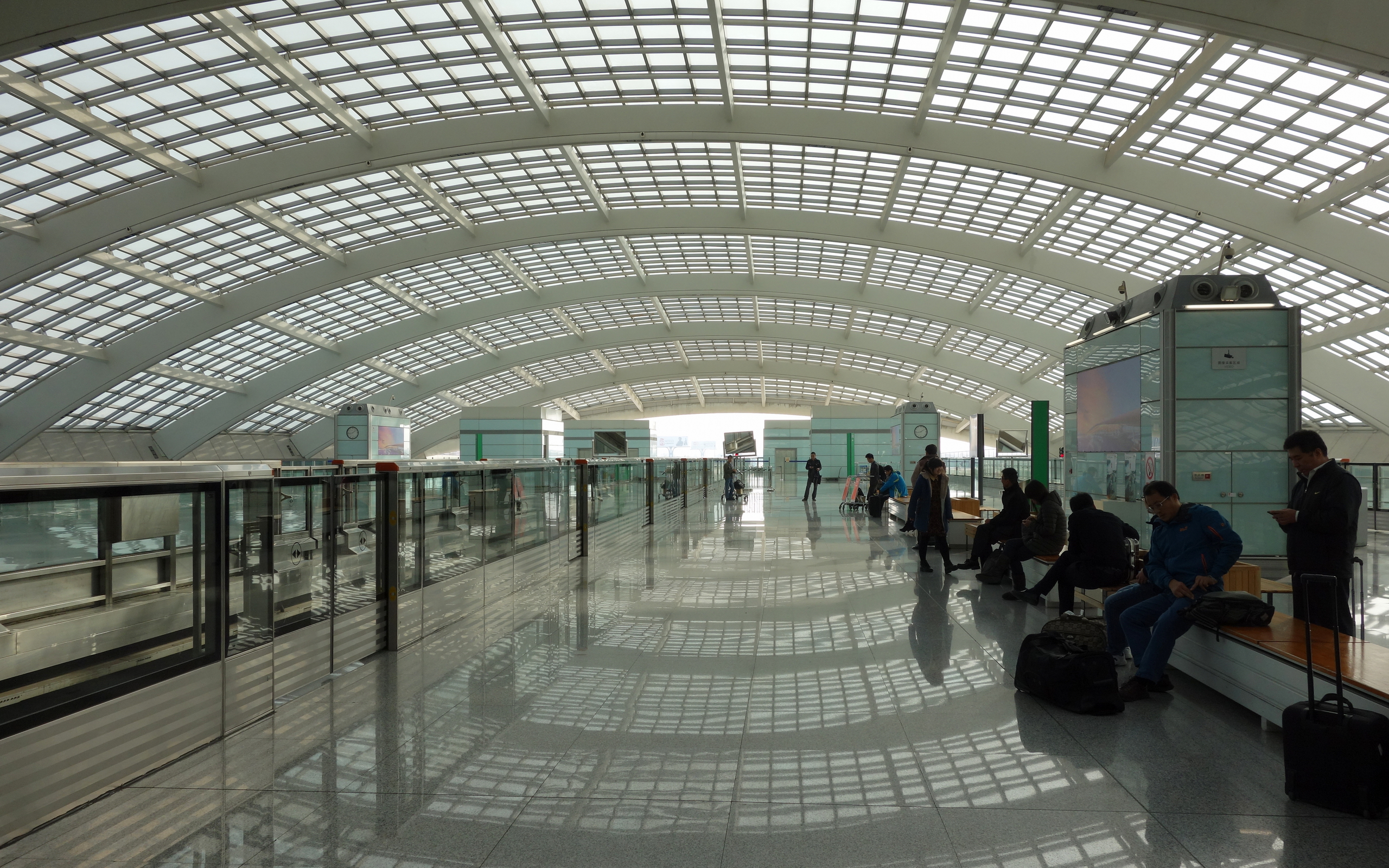 北京地铁机场线3号航站楼站站台